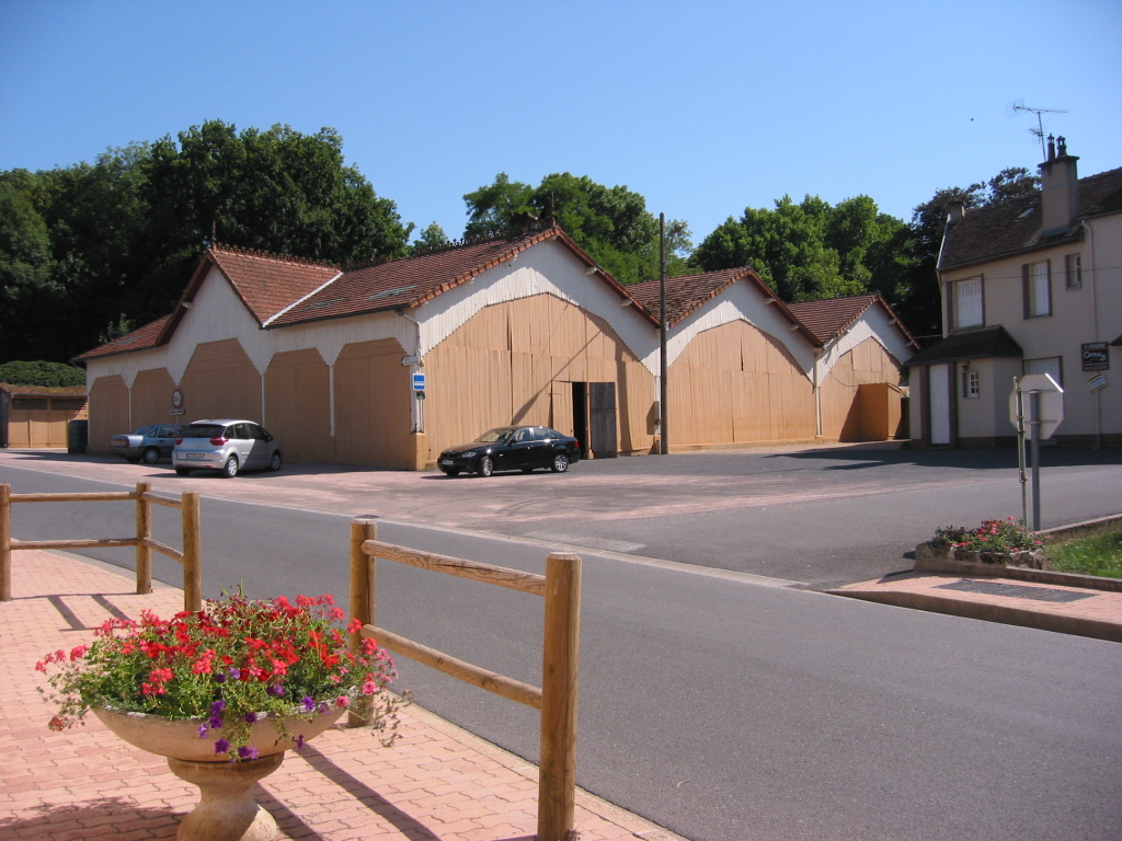 Jaligny-sur Besbre (France) - Le marché couvert